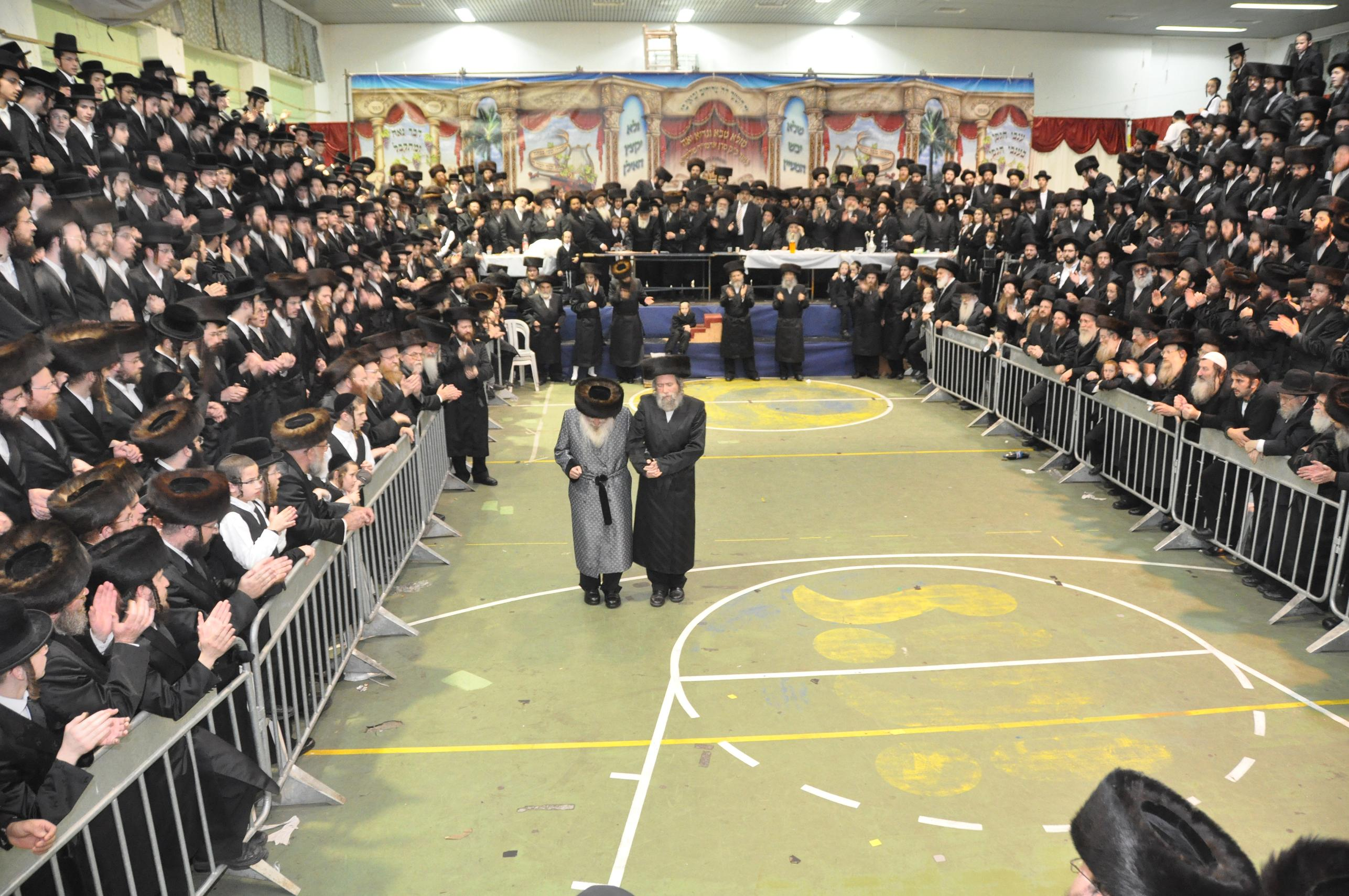 חסידות ערלוי